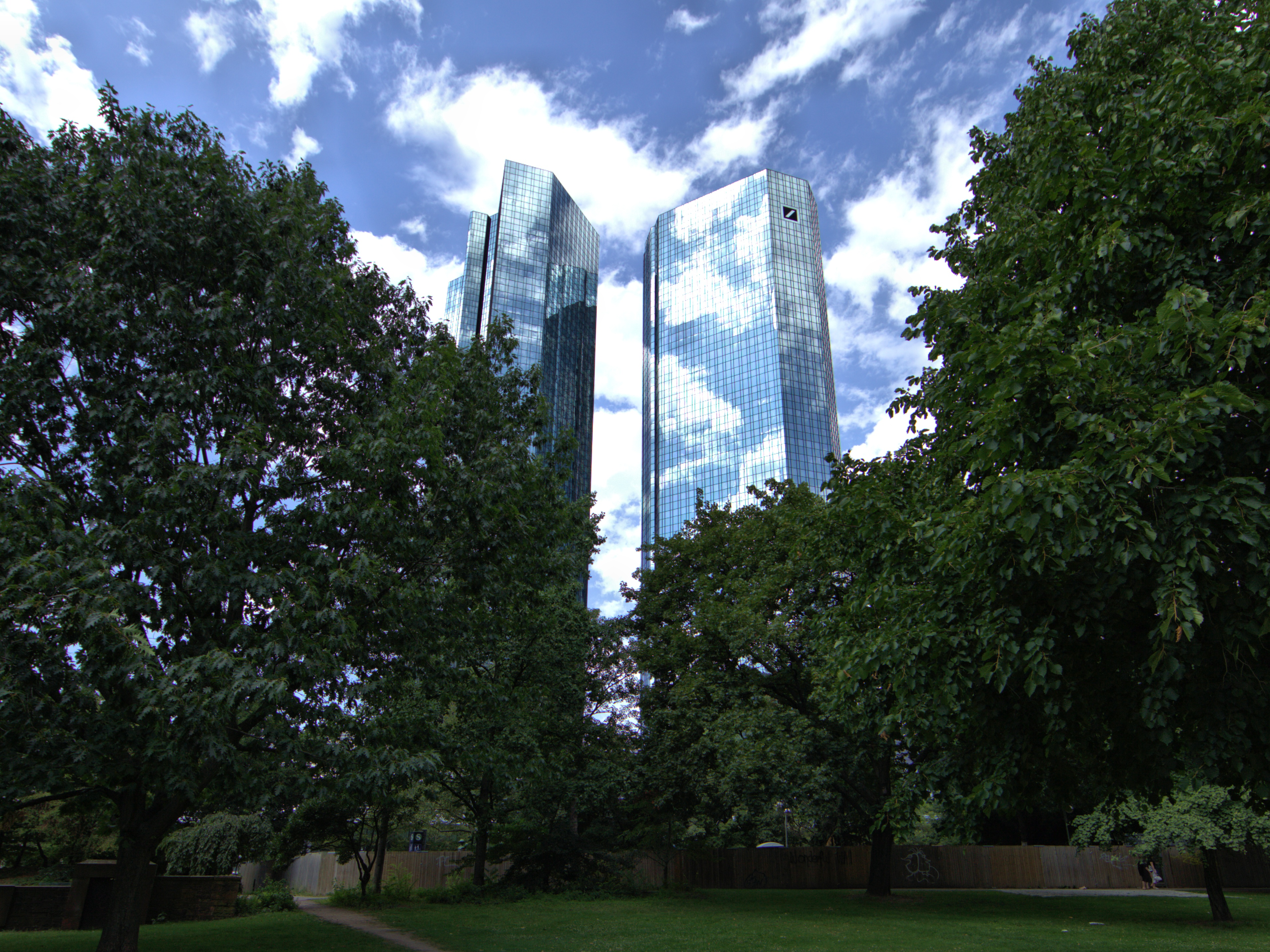 Tarnmodus einschalten...